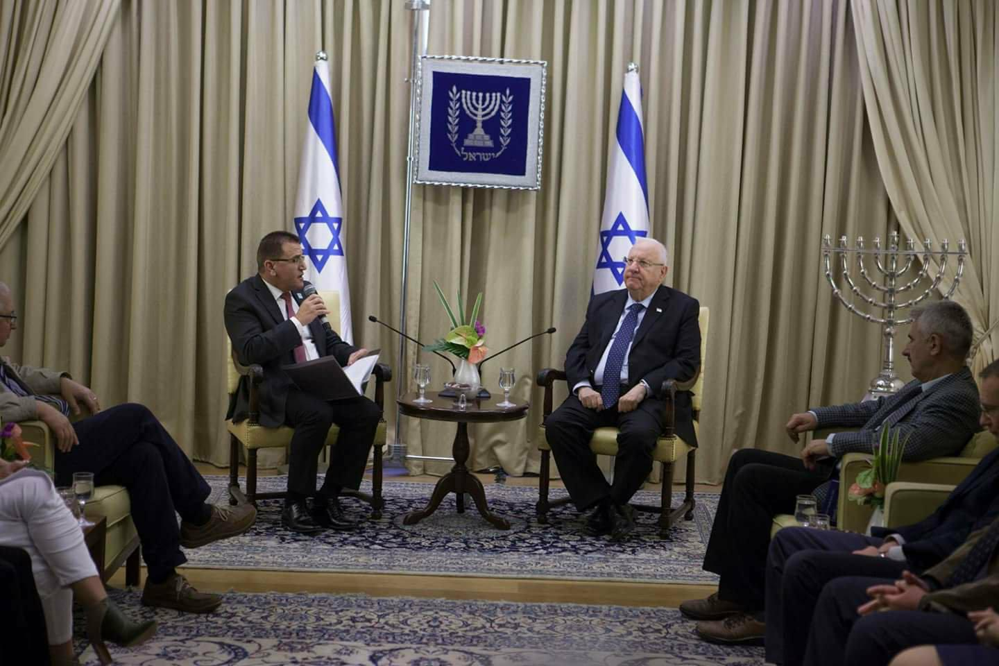 ד"ר סלמאן זרקא מבקר בבית הנשיא יחד עם צוות המרכז הרפואי זיו, ינואר 2018